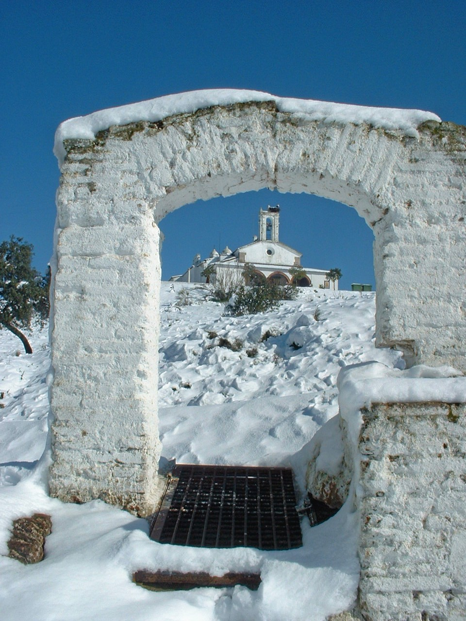 Pozo y ermita